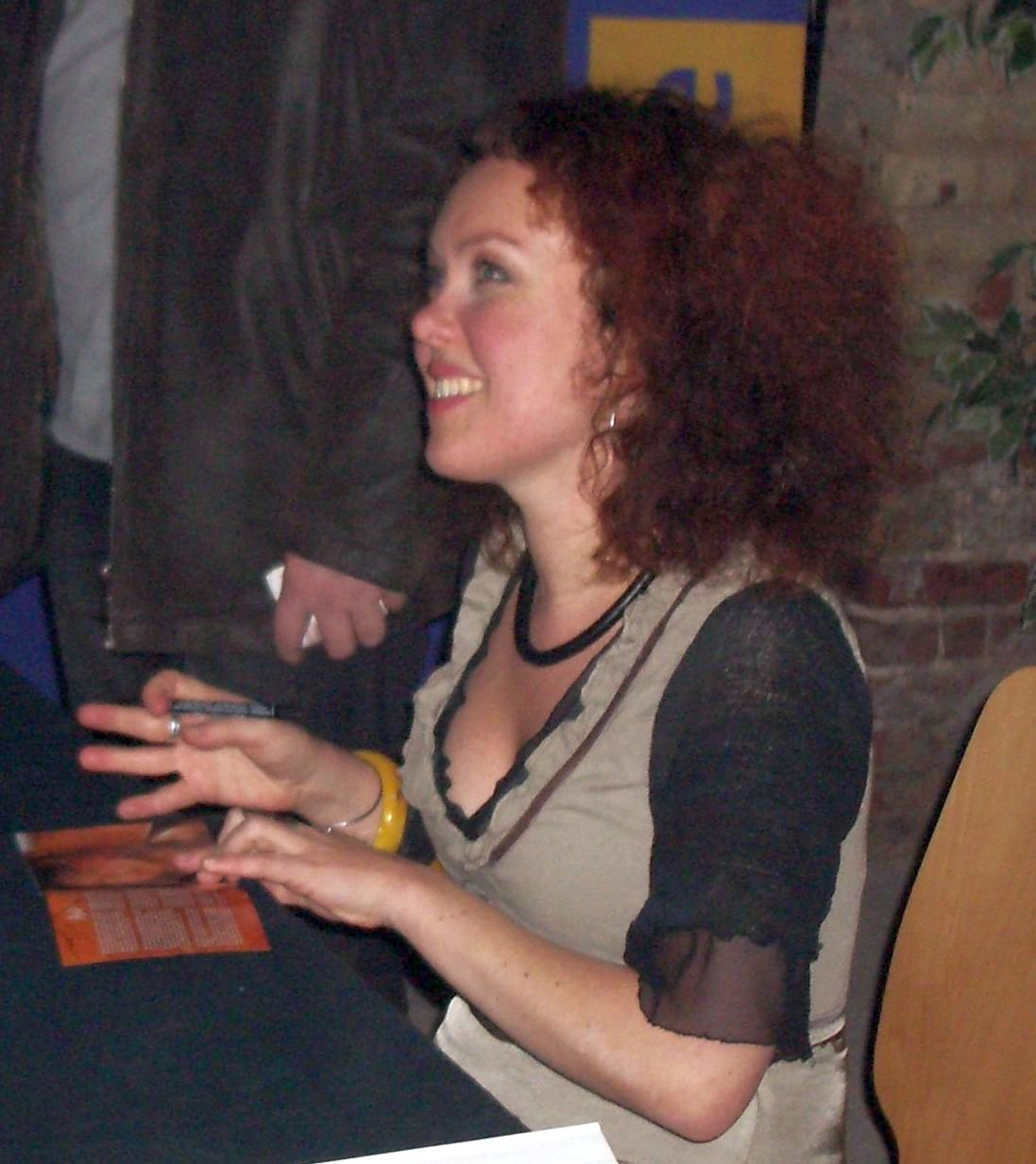 Kristin Asbjornsen nach Auftritt bei Jazzfestival St.Ingbert 2008